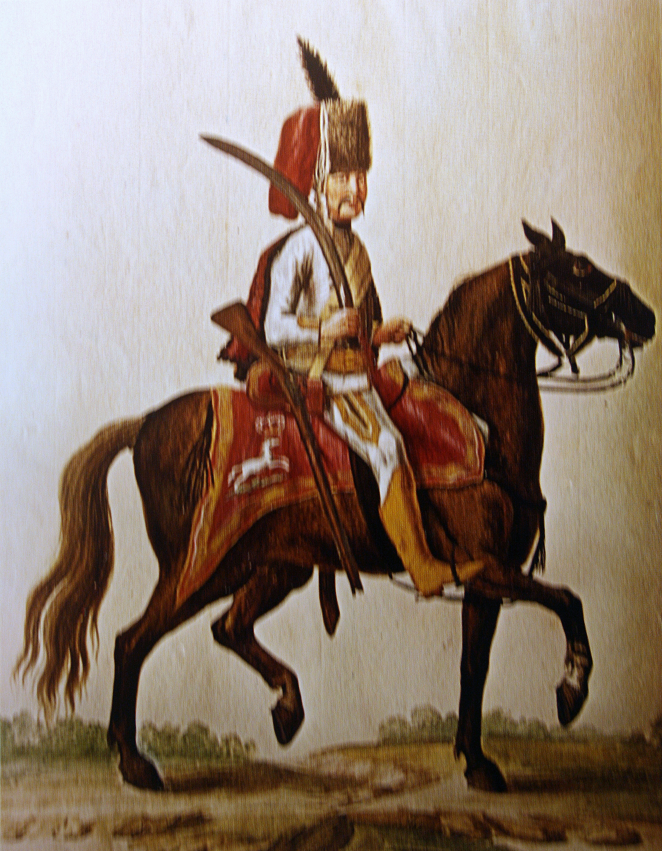 Lucknerscher Husar im Siebenjährigen Krieg.